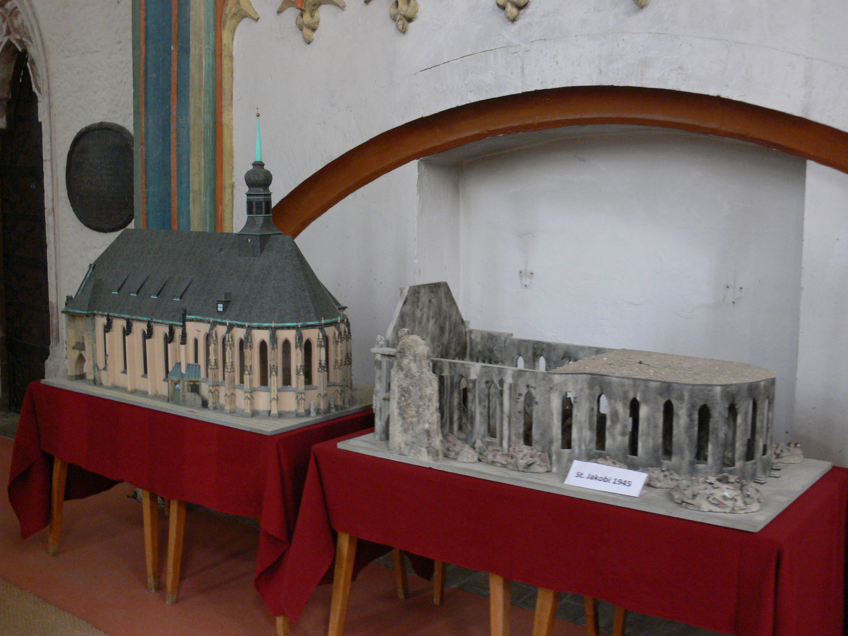 Stadtkirche St. Jakobi, Chemnitz Kirchenmodelle vor und nach der Zerstörung im 2. Weltkrieg